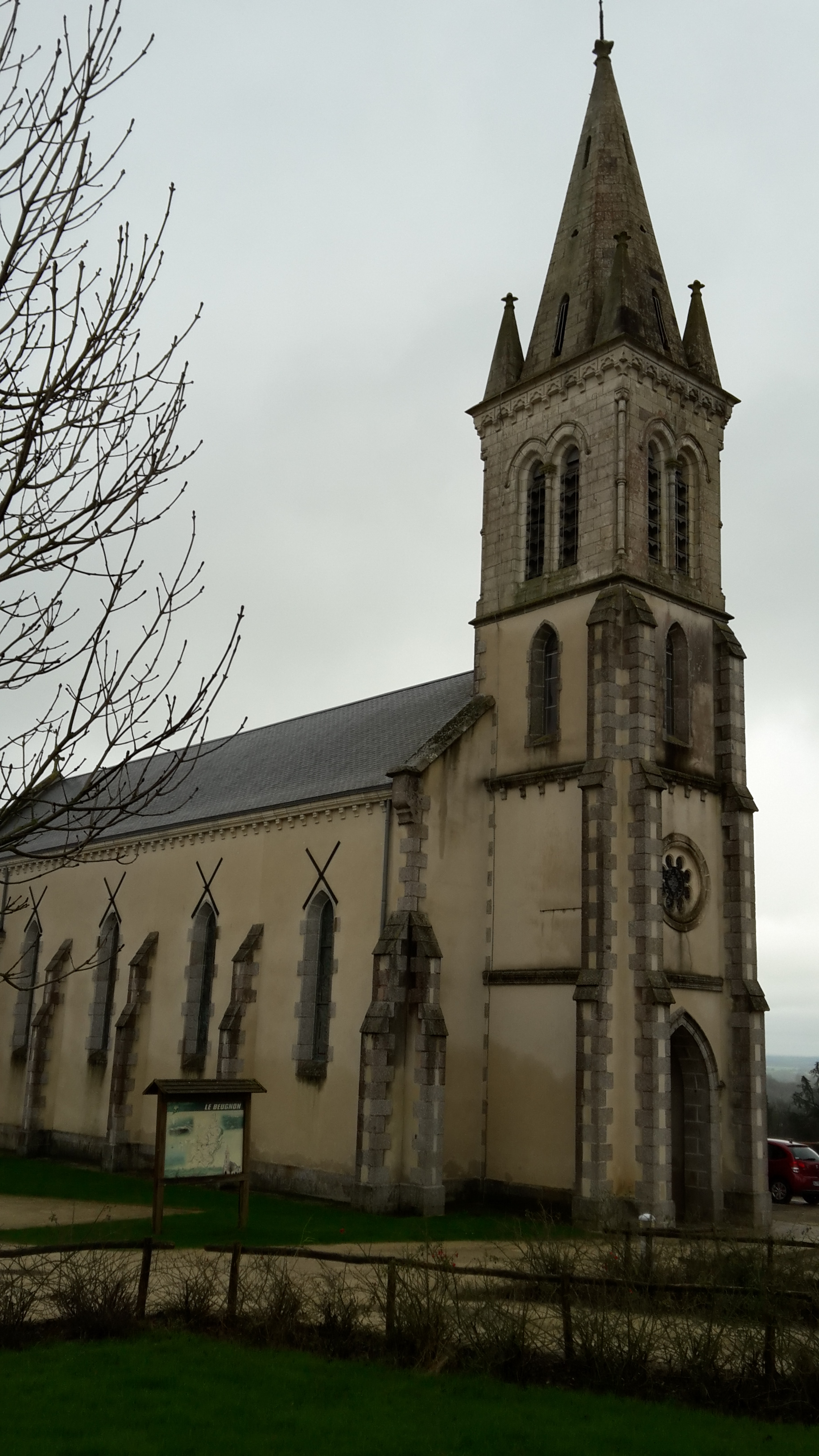 Église paroissiale du Beugnon (Deux-Sèvres)